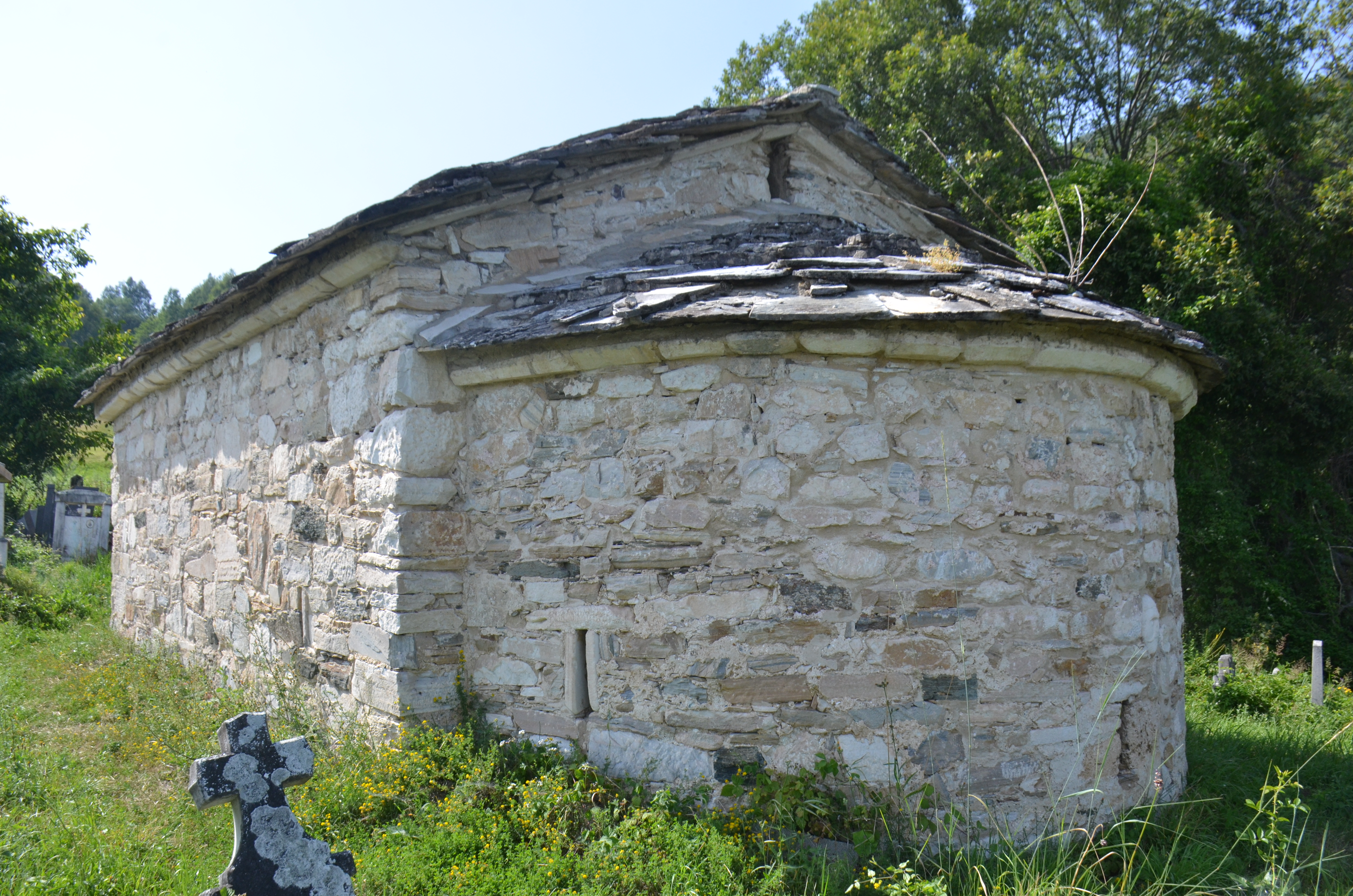 Црква Светог Ђорђа, село Врх, општина Краљево, Рашки округ